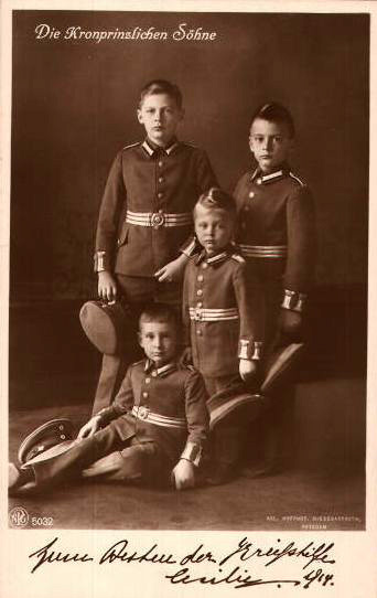 Die Kronprinzlichen Söhne (in Uniform). Kriegs-Wohlfahrtskarte .. der Frau Kronprinzessin zum Besten der Kriegshilfe, 1914. Mit Signatur von Kronprinzessin Cecilie Prince Wilhelm of Prussia (1906–1940) Prince Louis Ferdinand of Prussia (1907–1994) Prince Hubertus of Prussia (1909–1950) Prince Friedrich of Prussia (1911–1966)